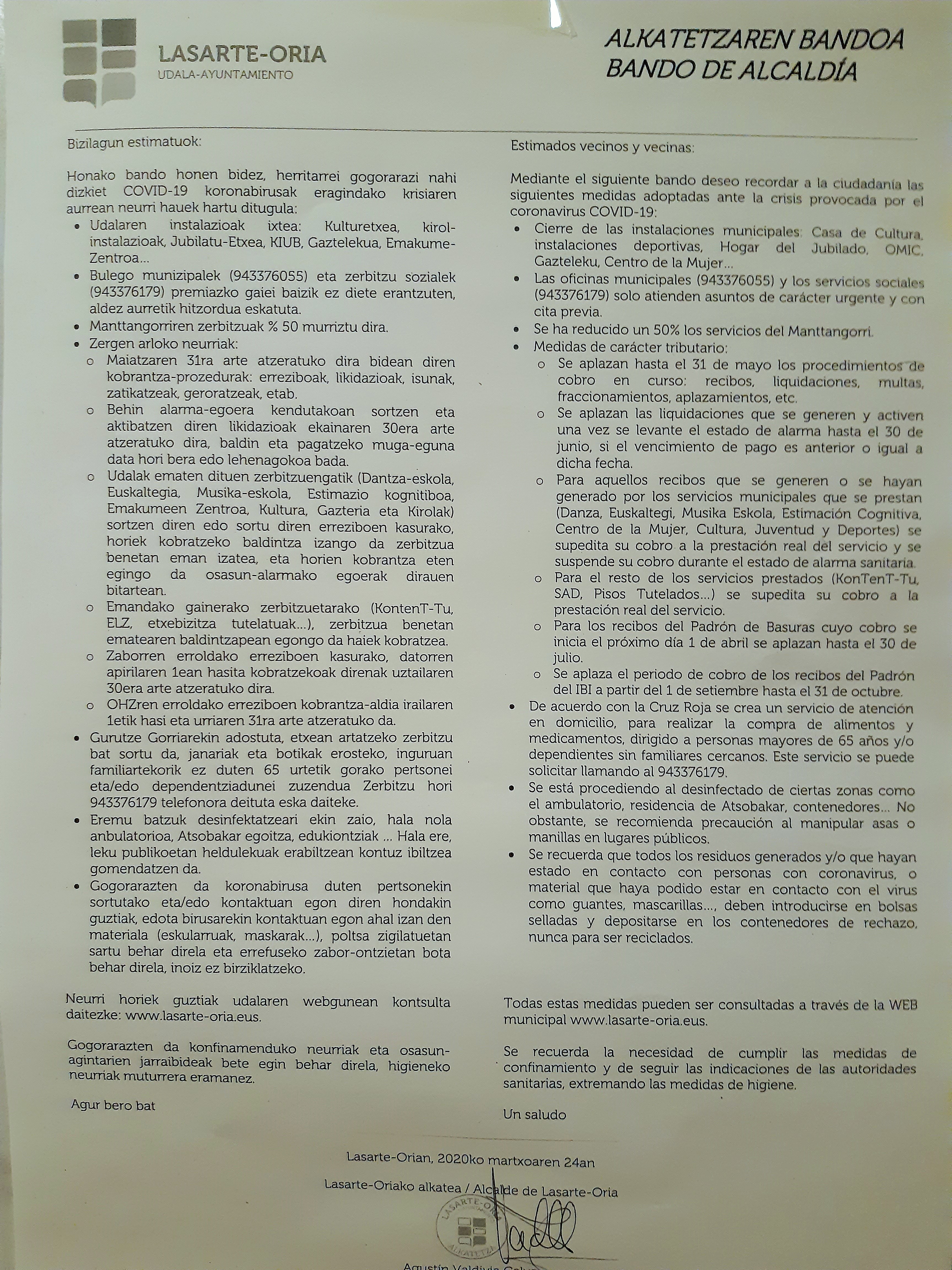 Lasarte-Oriako alkatetzak iragarritako neurriak COVID-19ren alarma egoeran